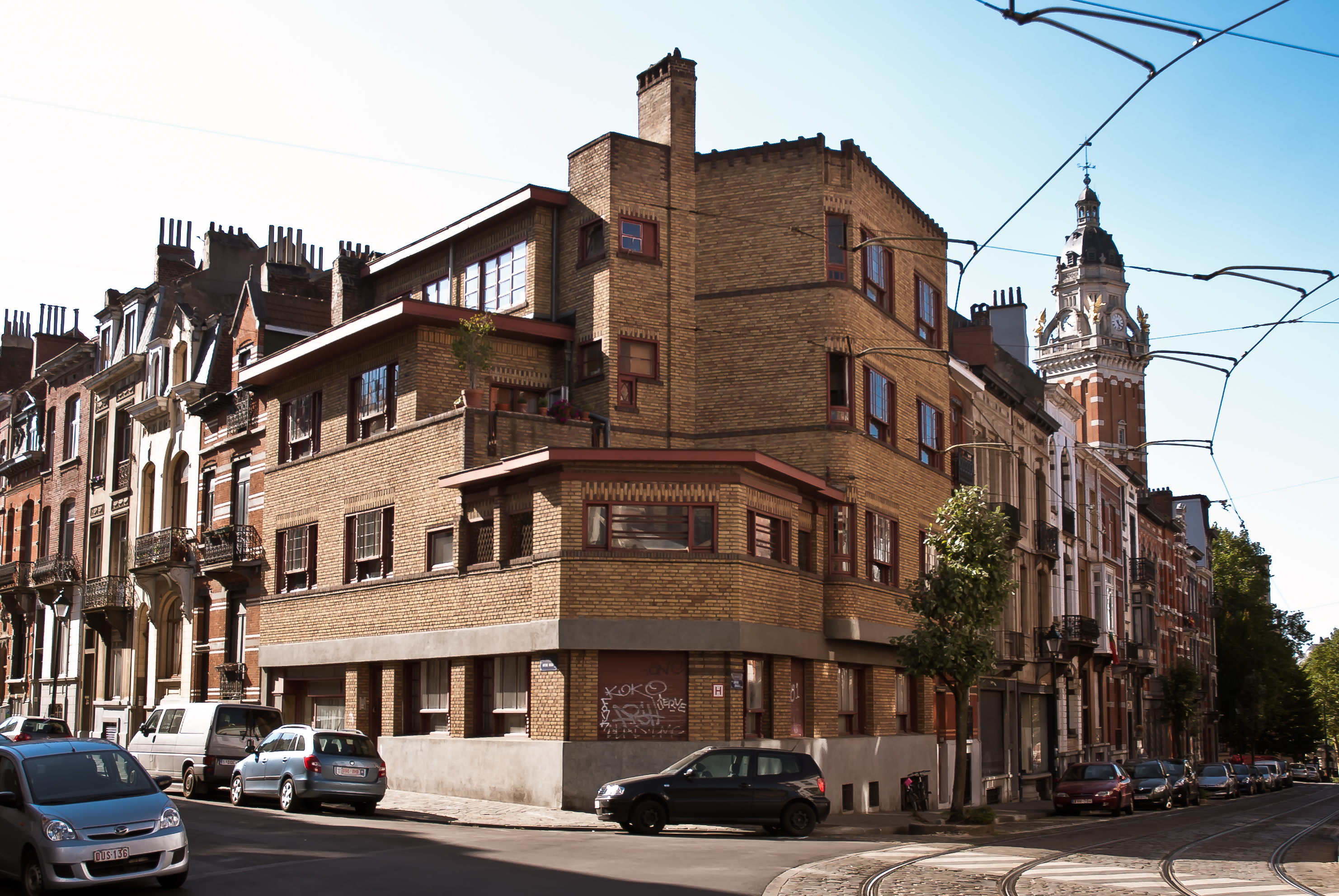 Construit en 1924 par Pierre VERBRUGGEN 2271-0021 0, aufgenommen von Stefan Bergmann